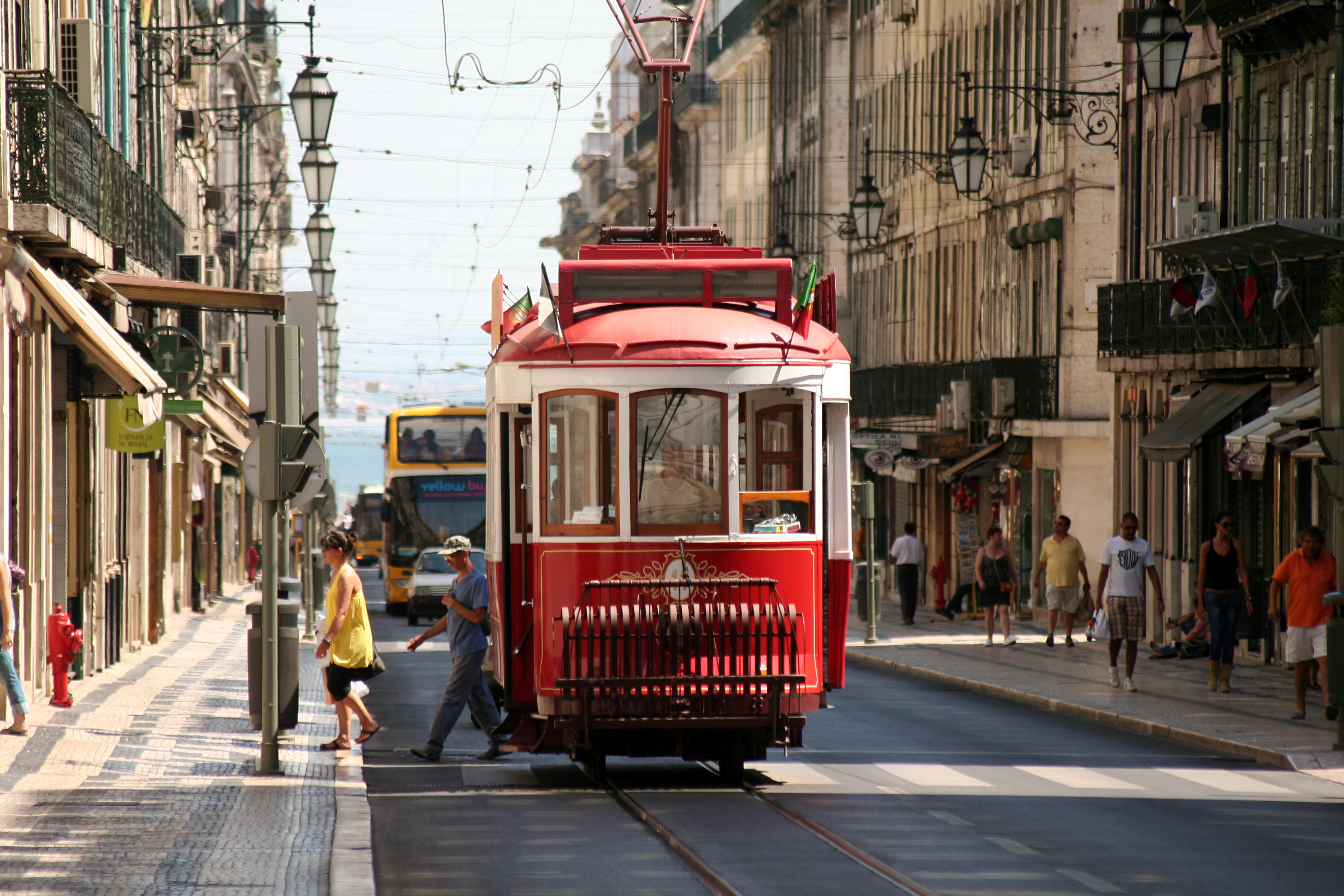 Tranvía por las calle portuguesas